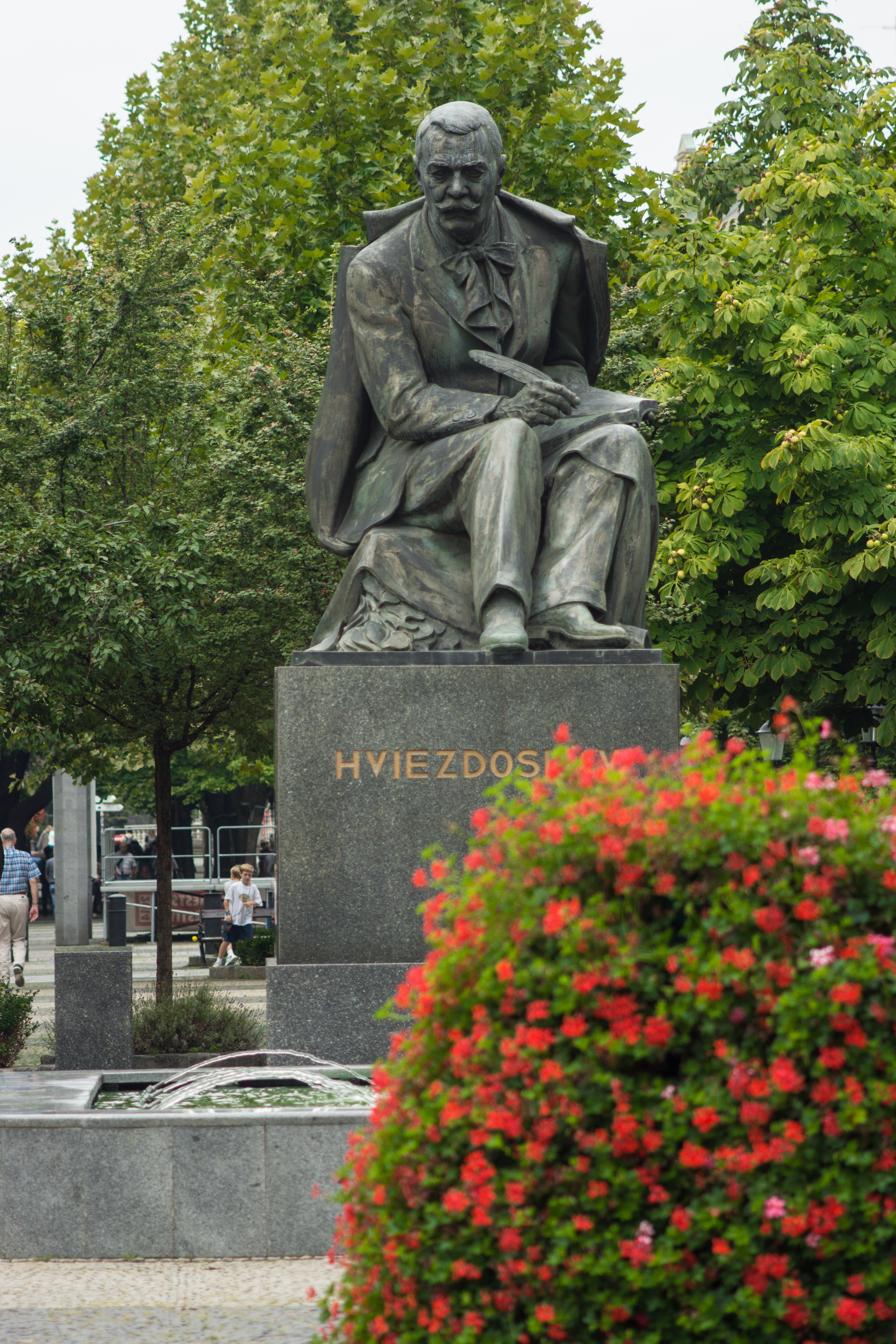 Estatua Memorial Pavol Országh Hviezdoslav